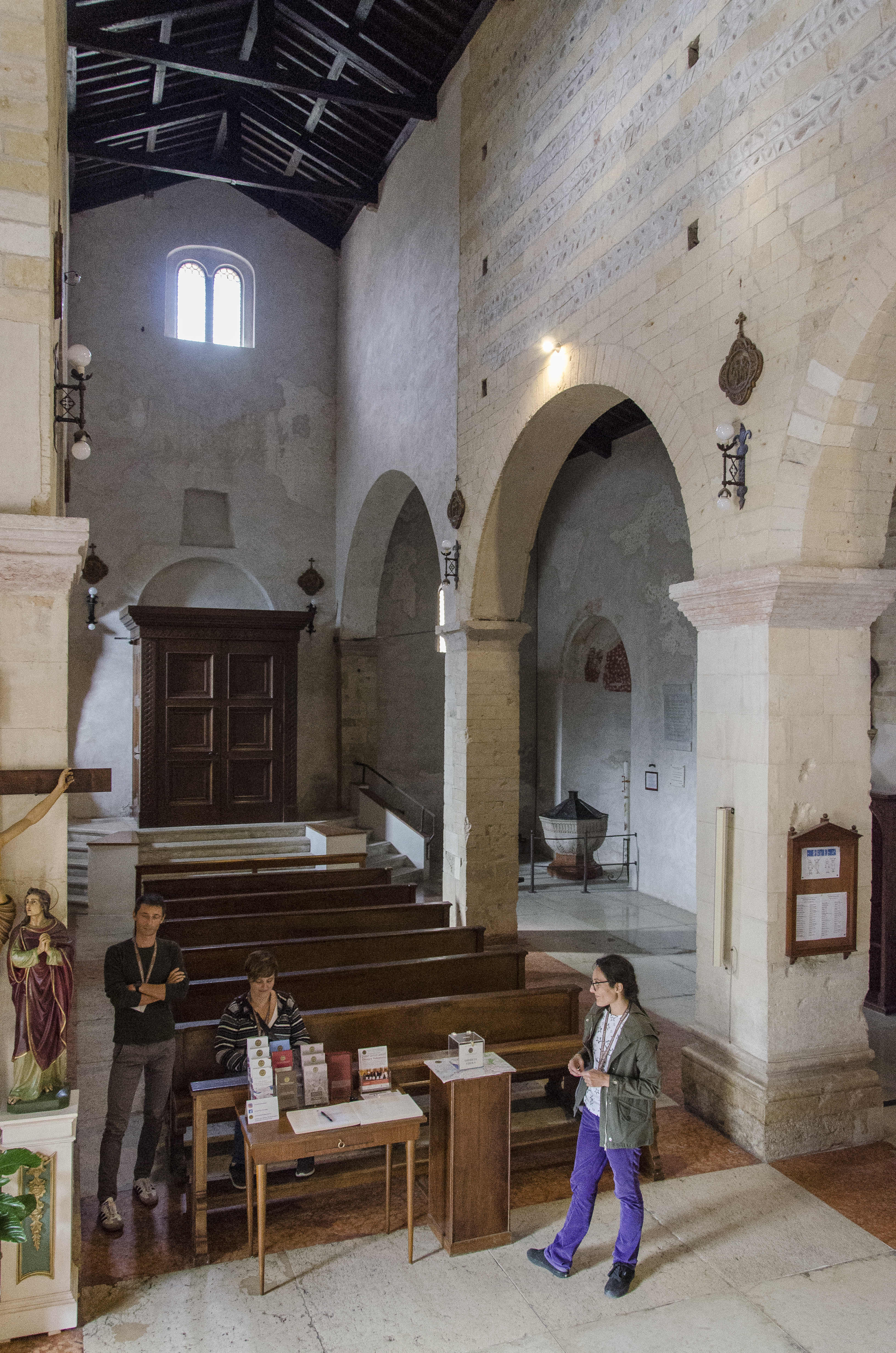 Aula della chiesa verso l'ingresso